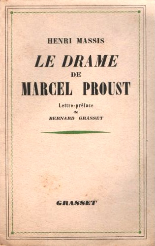 Henri Massis, "Le drame de Marcel Proust", préface de Bernard Grasset, éditions Grasset, 1937.